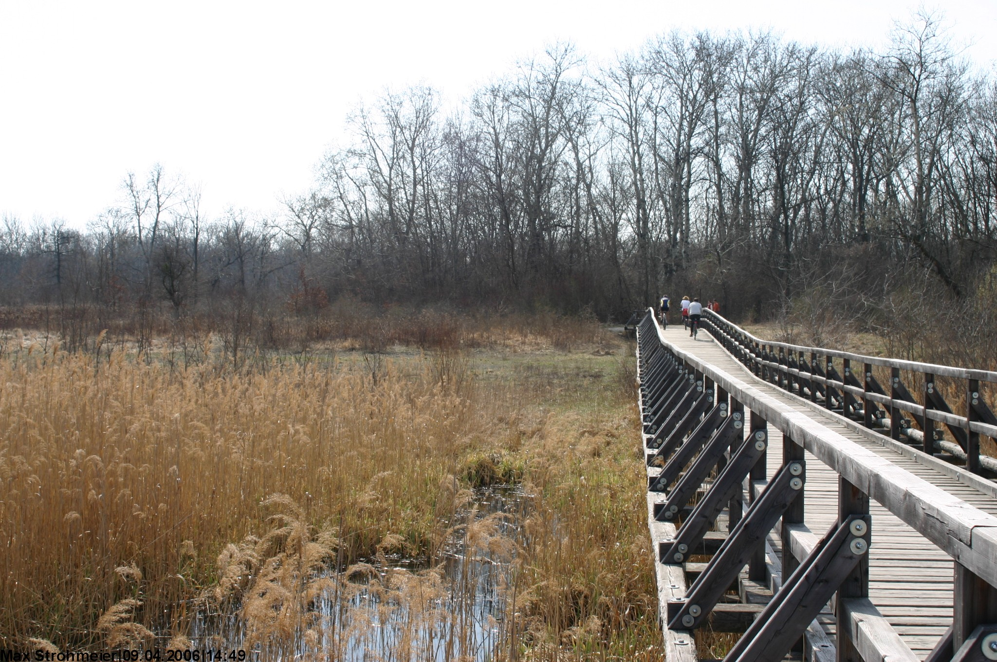 Lobau vom Josefsteig aus fotografiert.